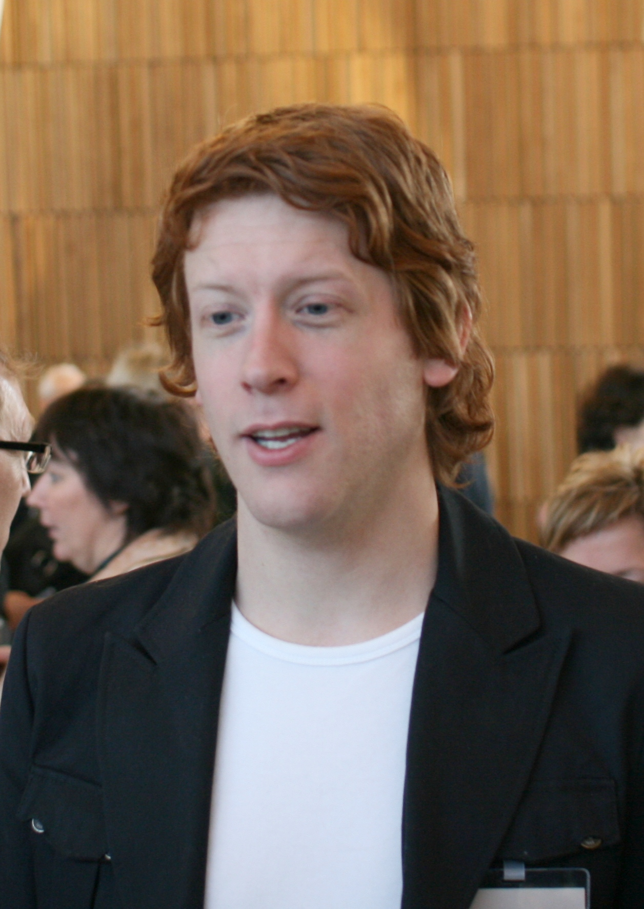 Martin Henriksen, AUF-leder. Fra NHOs Årskonferanse 2009.